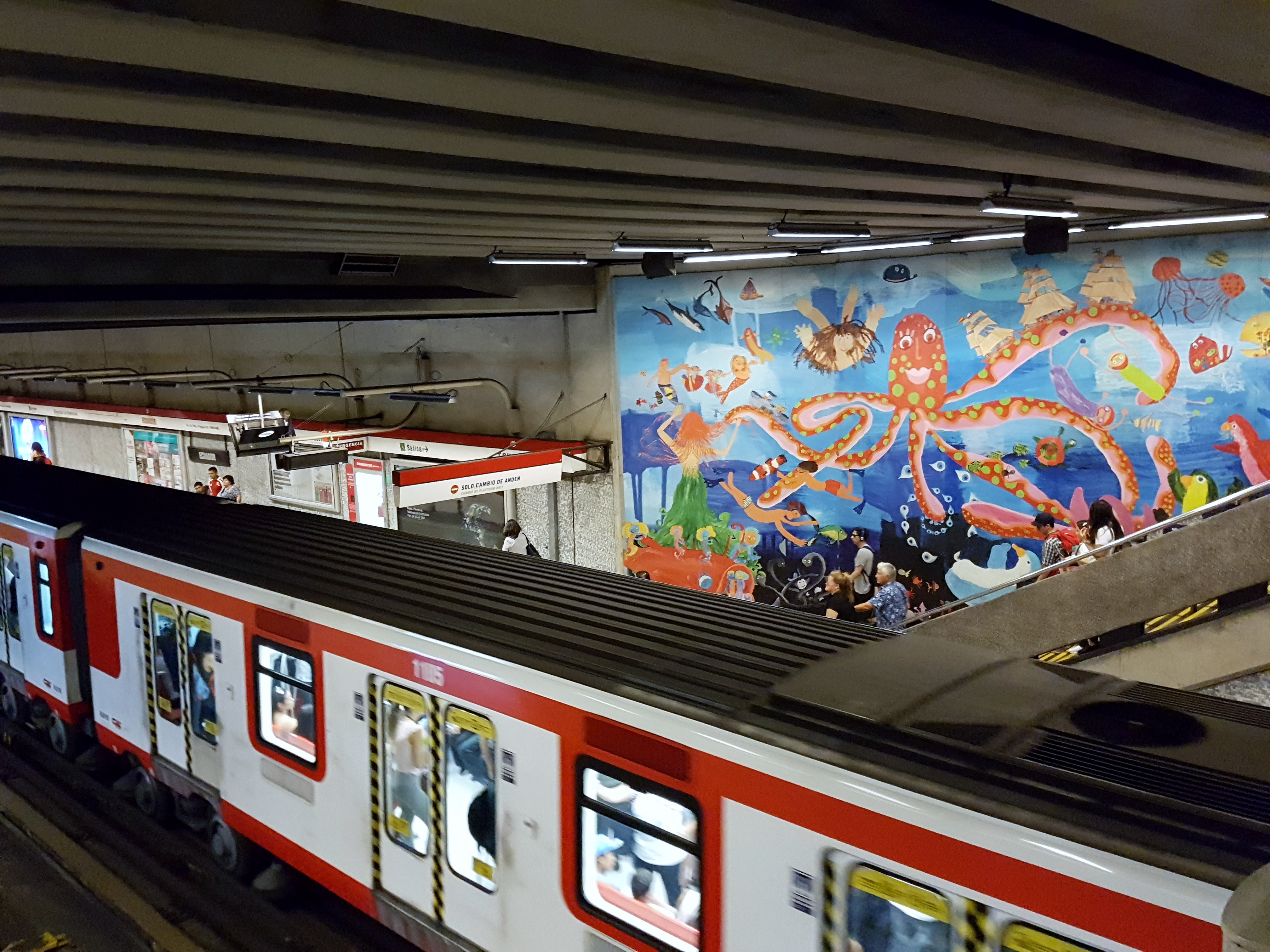 El metro Ecuador está adornado con murales realizados por el pintor Jorge Artus (artista con discapacidad: no tiene brazos) y los niños del taller de arte de la Teletón, Santiago de Chile.